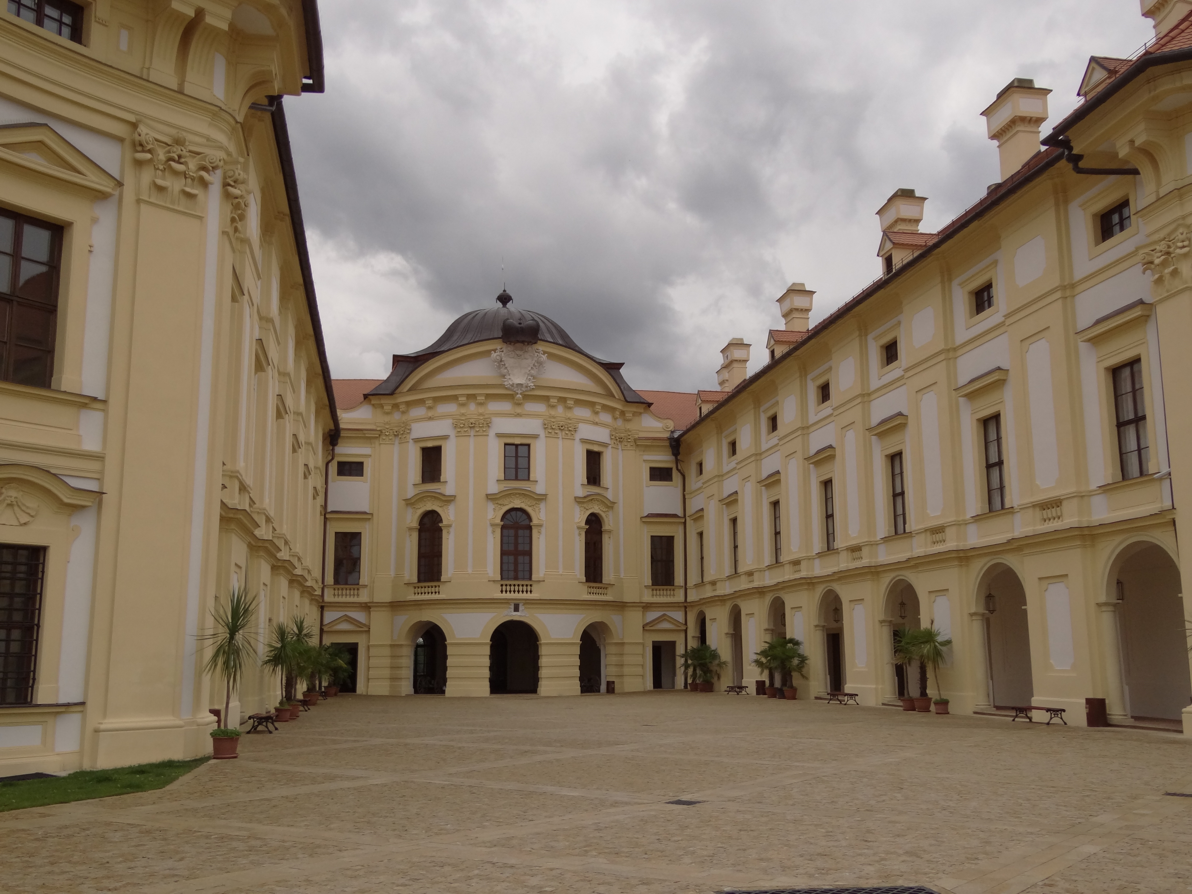 Zámek Slavkov u Brna - hlavní nádvoří